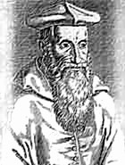 Stanisław Hozjusz